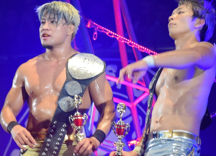 2017年11月5日 大阪府立体育会館「POWER STRUGGLE」 ロッポンギ3K（SHO & YOH）